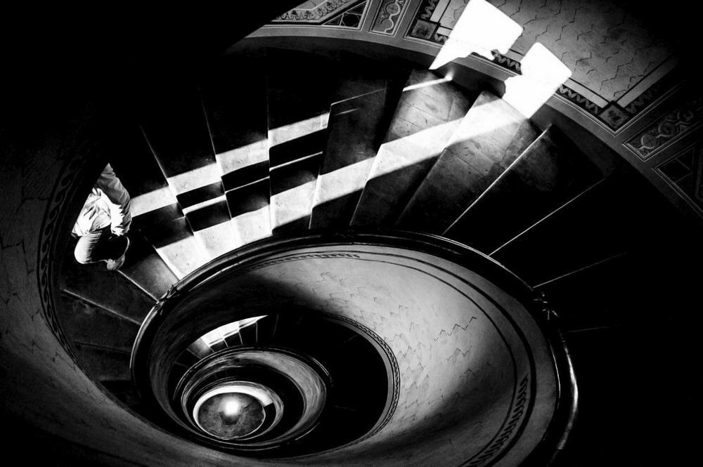 Scala del Vignola. Palazzo Boncompagni